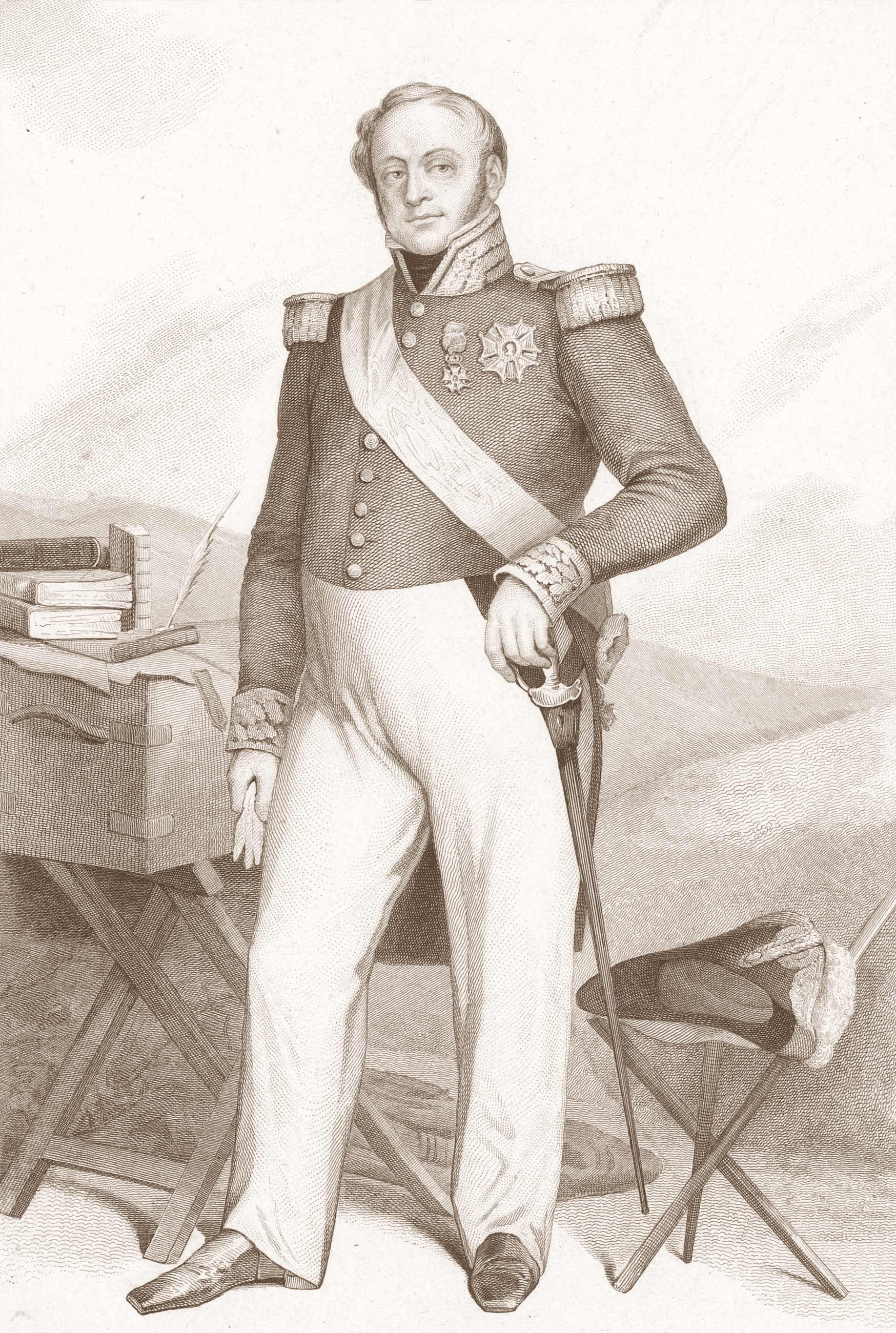 Bertrand Clauzel (1773-1842), maréchal de France